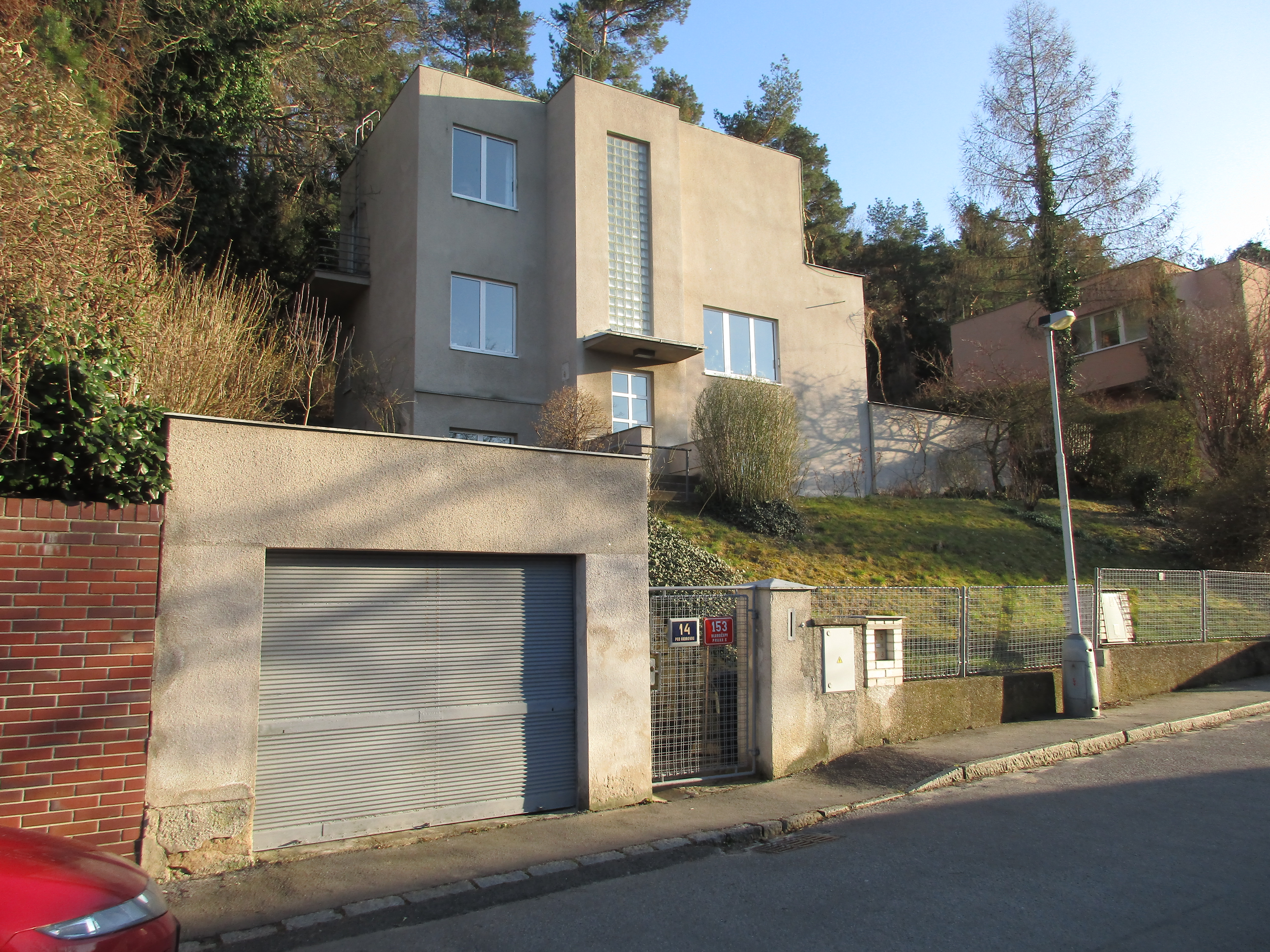 Pod Habrovou 153/14, Praha 5-Hlubočepy